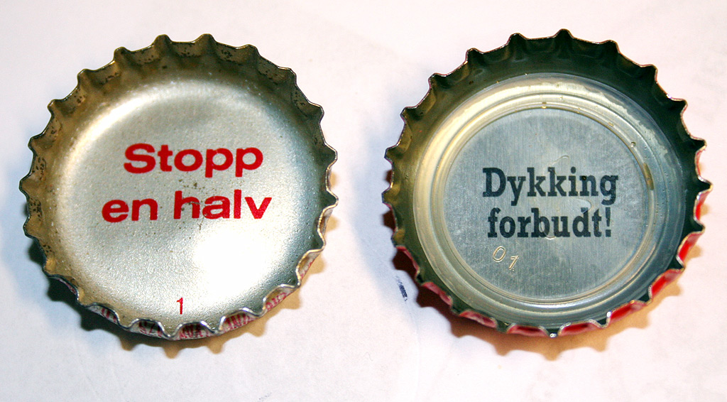 Gorker er slagord inne i colakorker. Gorken til venstre er første gorken i den første serien utgitt tidlig på 70-tallet. Til høyre en gork fra 2008.